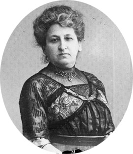 Aletta Jacobs (1854–1929) - bewerking van File:Aletta Jacobs2.jpg